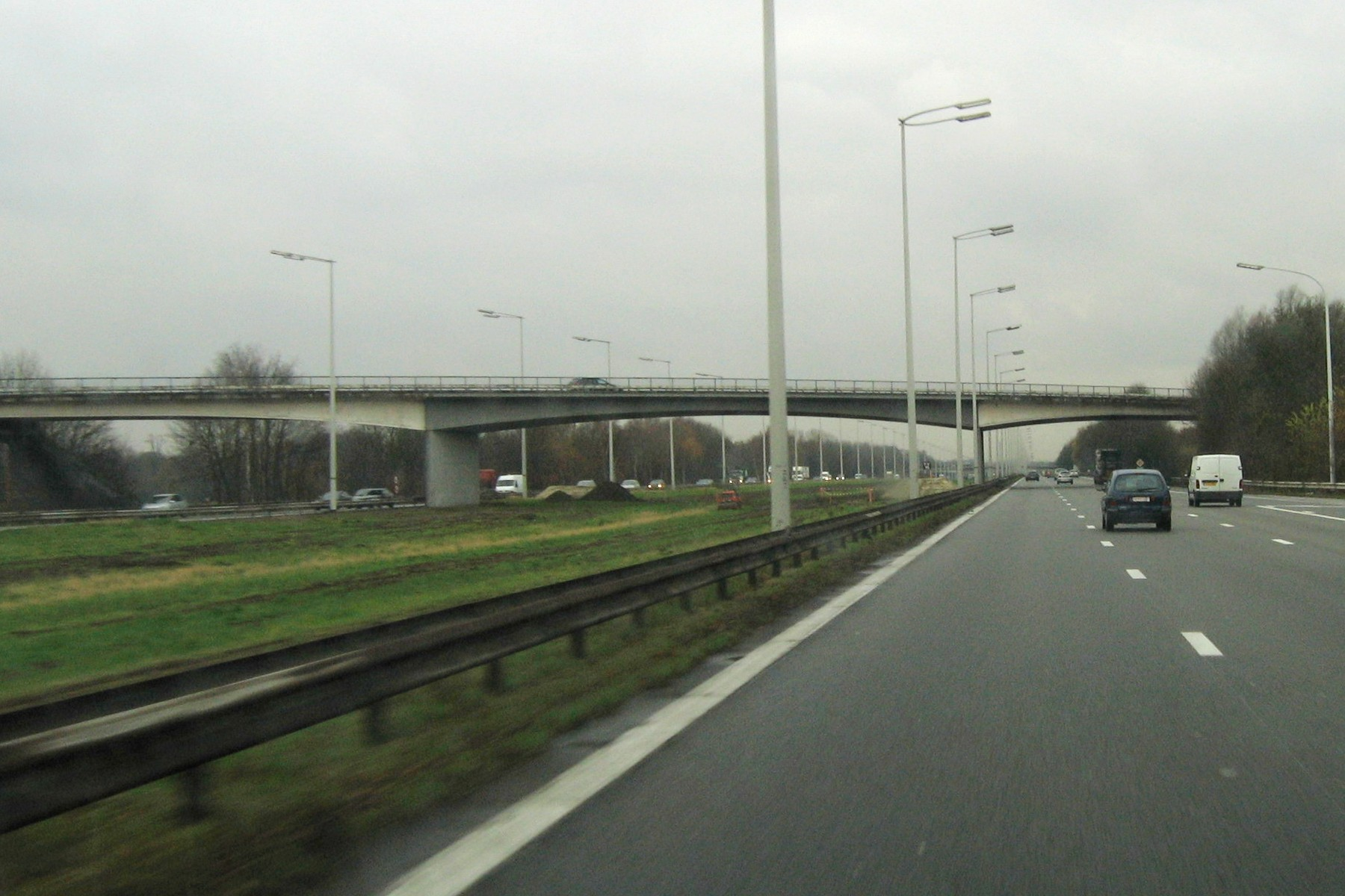 Autobahn von Antwerpen nach Brüssel. In der Mitte wurde Platz für Expressspuren freigehalten.